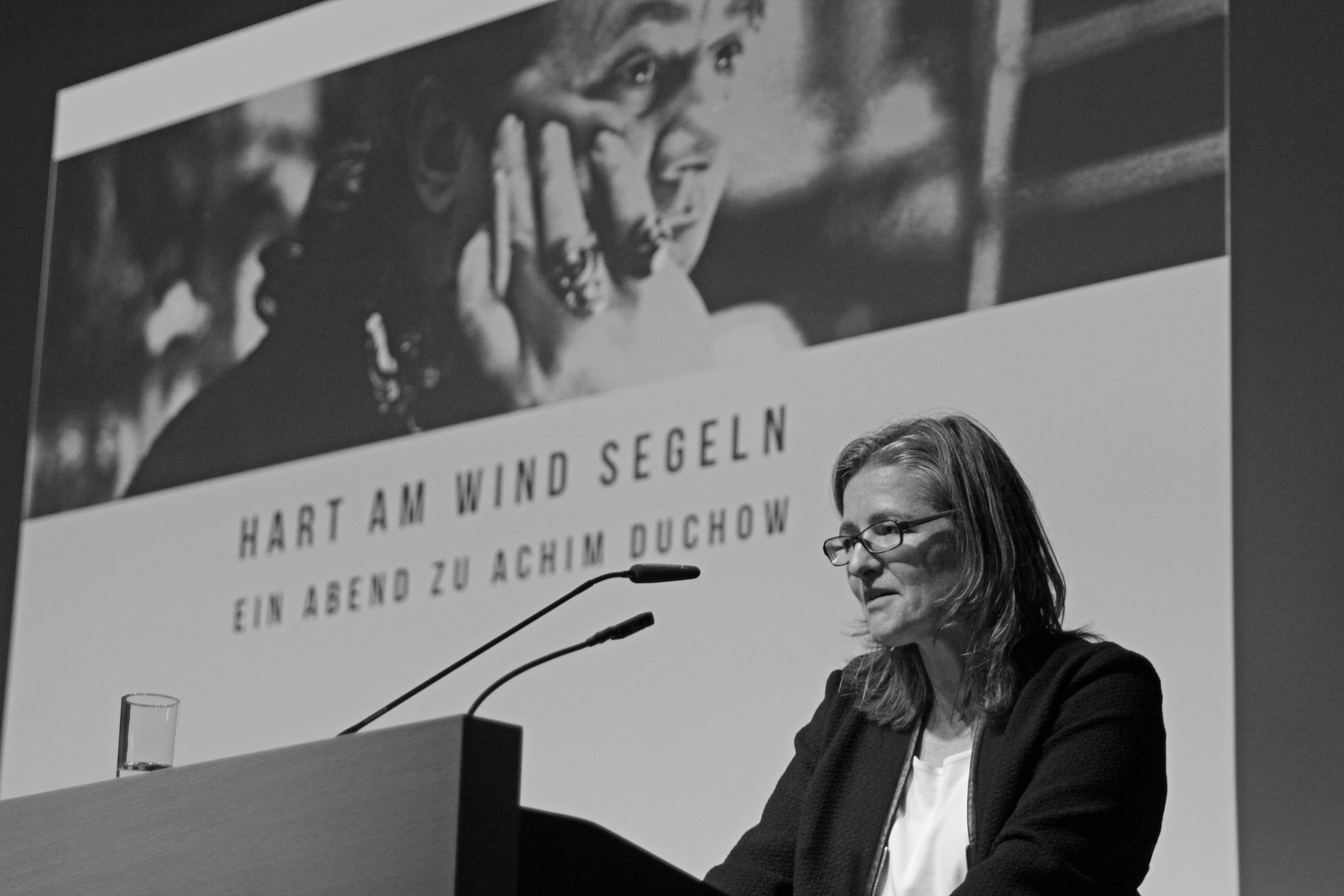 Jun.-Prof. Dr. Ulli Seegers spricht beim Symposium "Hart am Wind segeln - Ein Abend zu Achim Duchow". Foto: Jochen Müller, 2016.